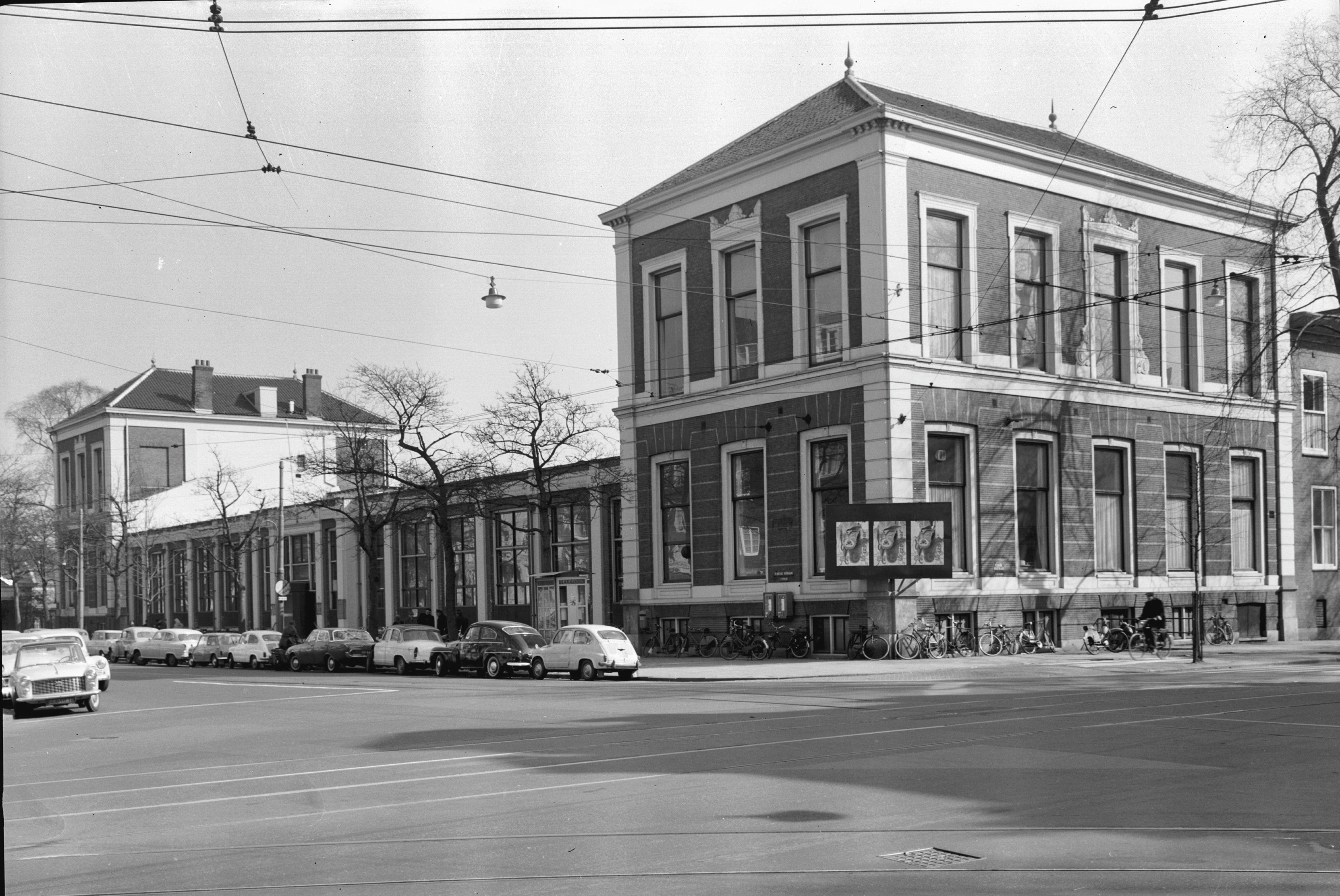 Dierentuin Artis: aanzicht